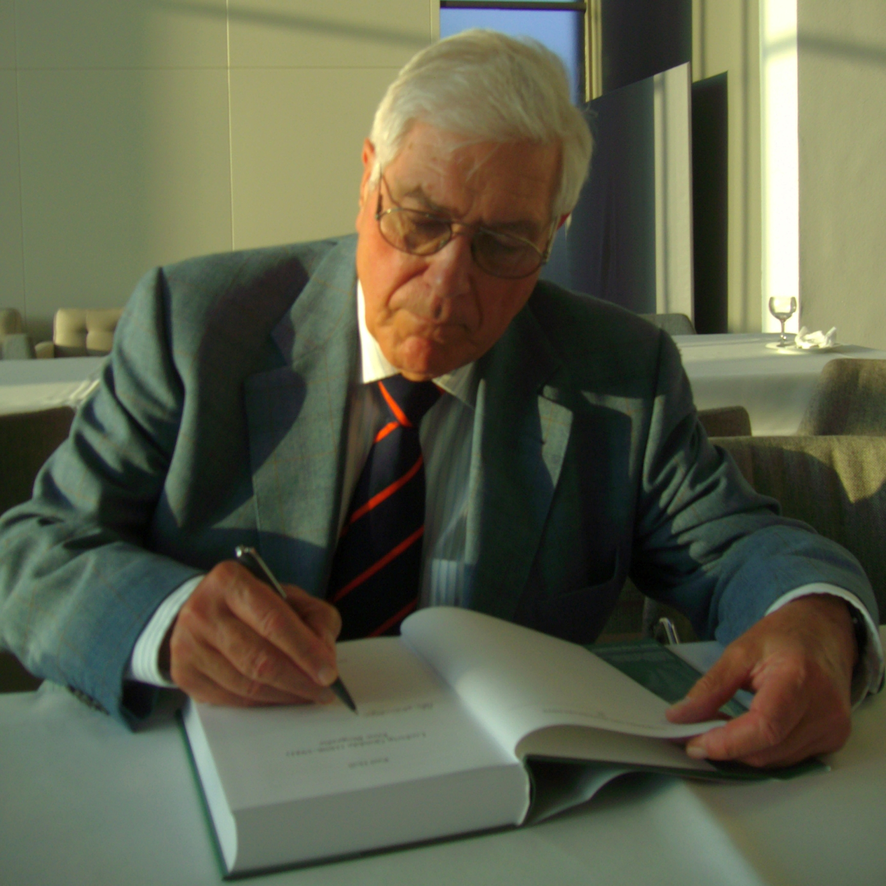 Karl Holl signiert sein Buch Ludwig Quidde (1858–1941). Eine Biografie. Droste, Düsseldorf 2007, anlässlich der Buchpräsentation im Haus der Bremischen Bürgerschaft, Bremen.